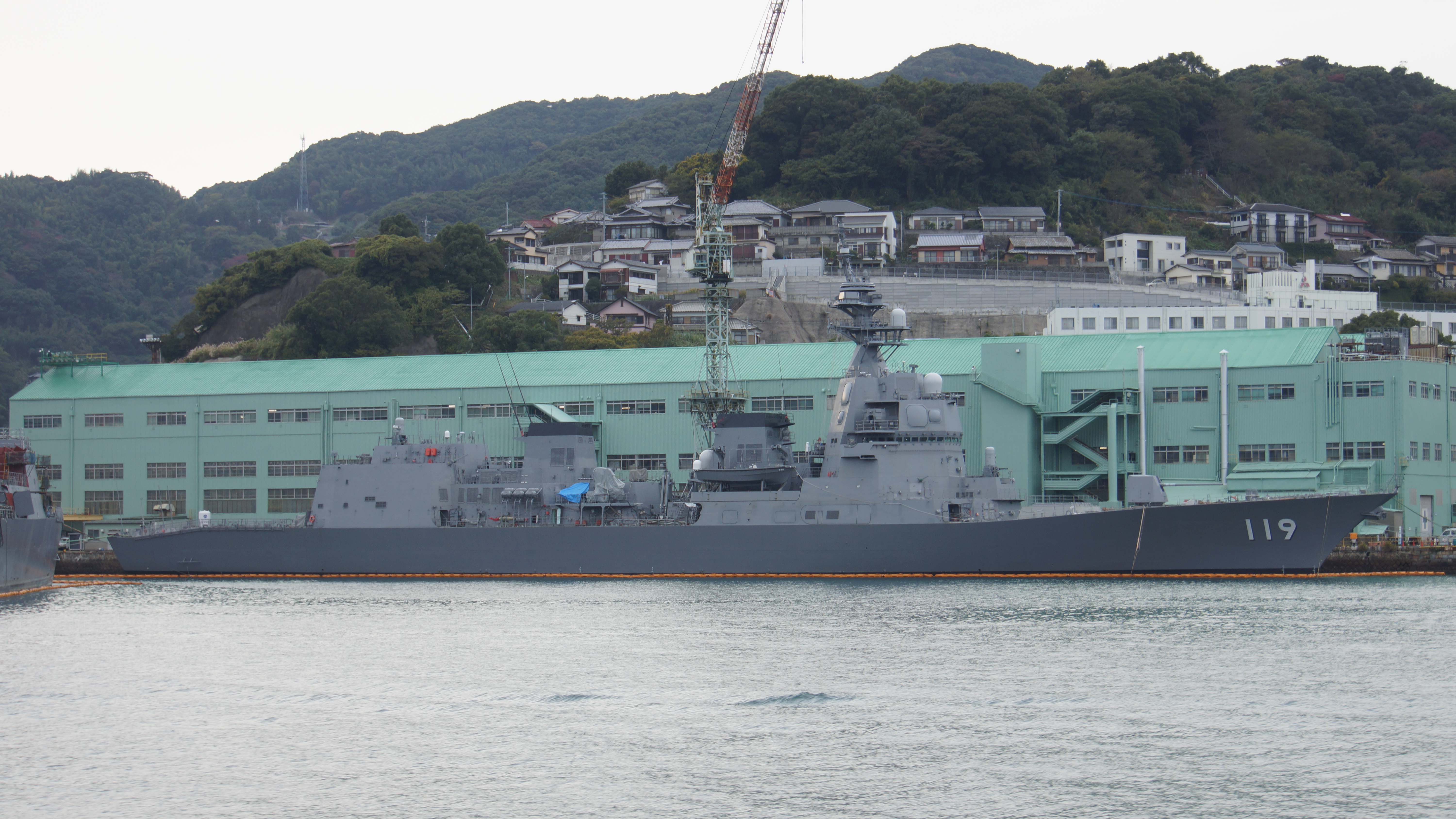 海上自衛隊 護衛艦あさひ（DD-119） 右舷前面。2017年11月25日 三菱重工業長崎造船所にて。